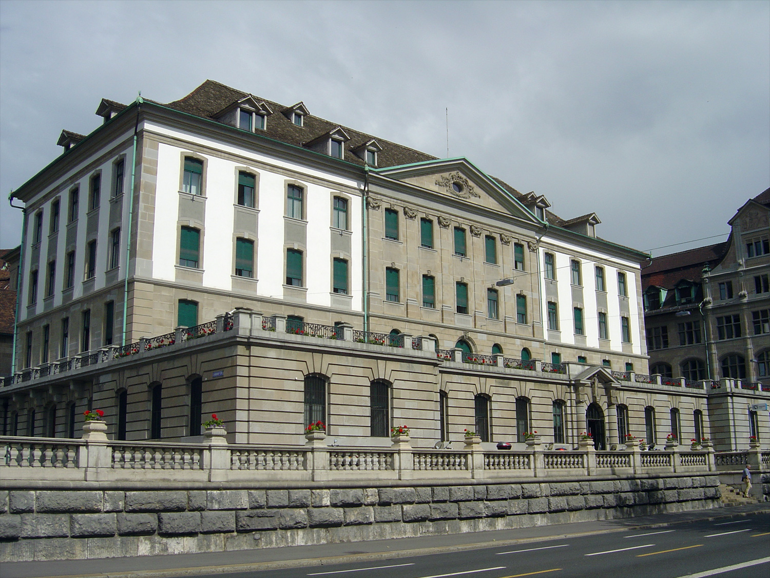 Das ehemalige Waisenhaus von Zürich, erbaut von Gaetano Matteo Pisoni, heute Hauptwache der Stadtpolizei Zürich bzw. Amtshaus I der Zürcher Stadtverwaltung